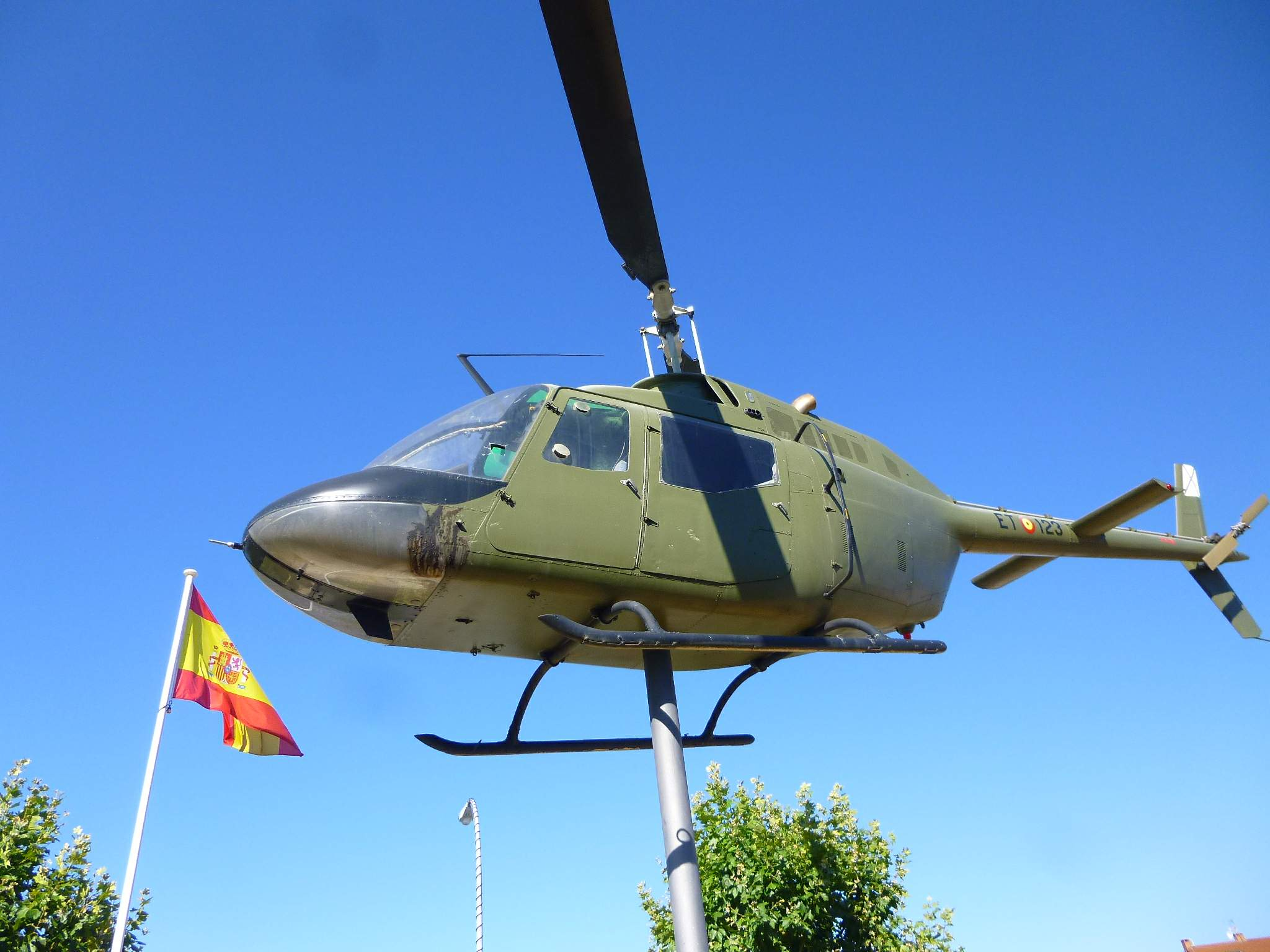 La Rotonda Sargento Joga, en Colmenar Viejo (Madrid)